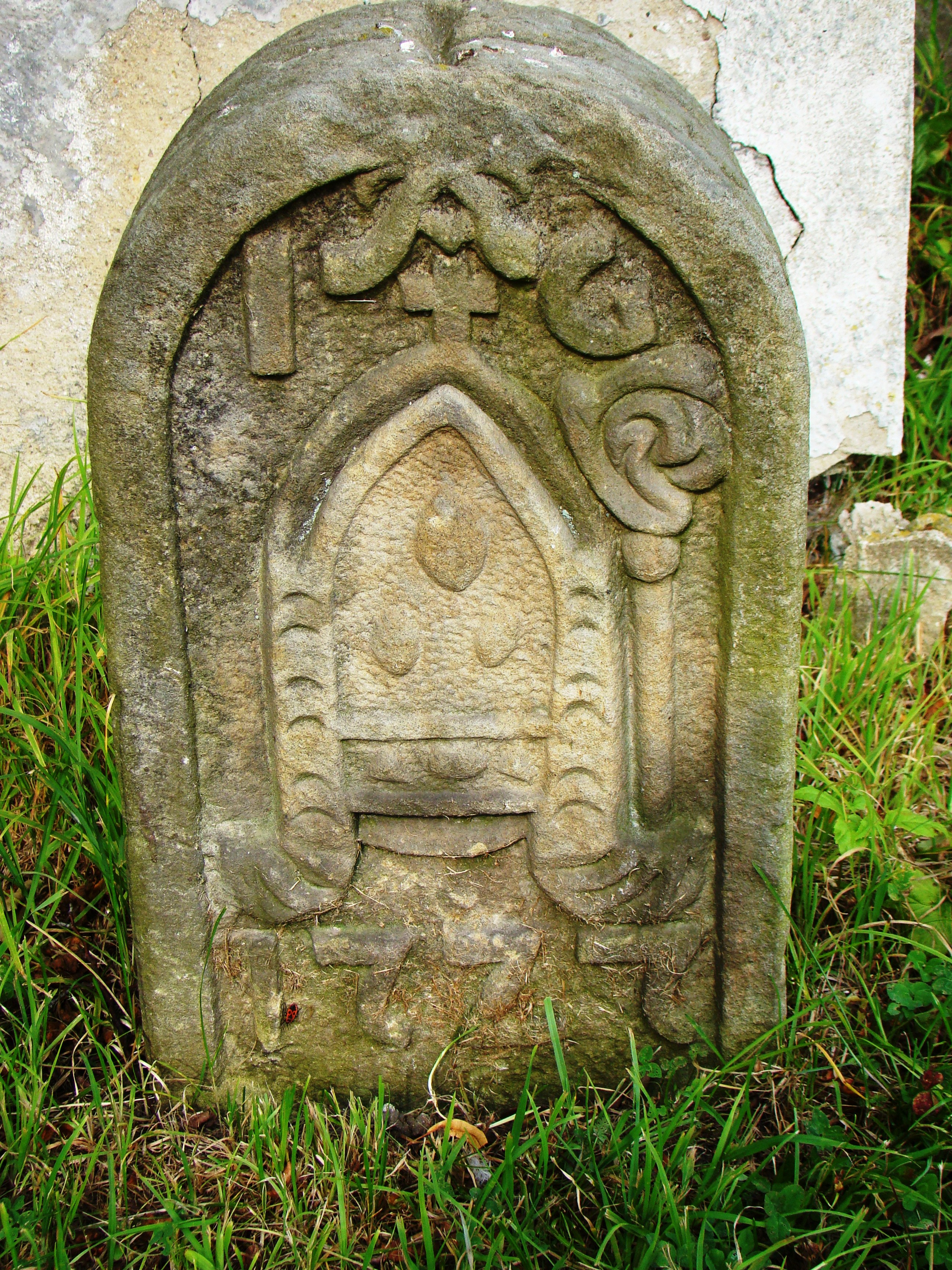 zespół rezydencji opackiej: - kościół p.w. Świętych Wspomożycieli, 1685, 1723, - pałac, ob. dom mieszkalny nr 22, 1687, k. XVIII, - oficyny, - budynki inwentarskie Lubawka - Ulanowice (Podlesie), Lubawka